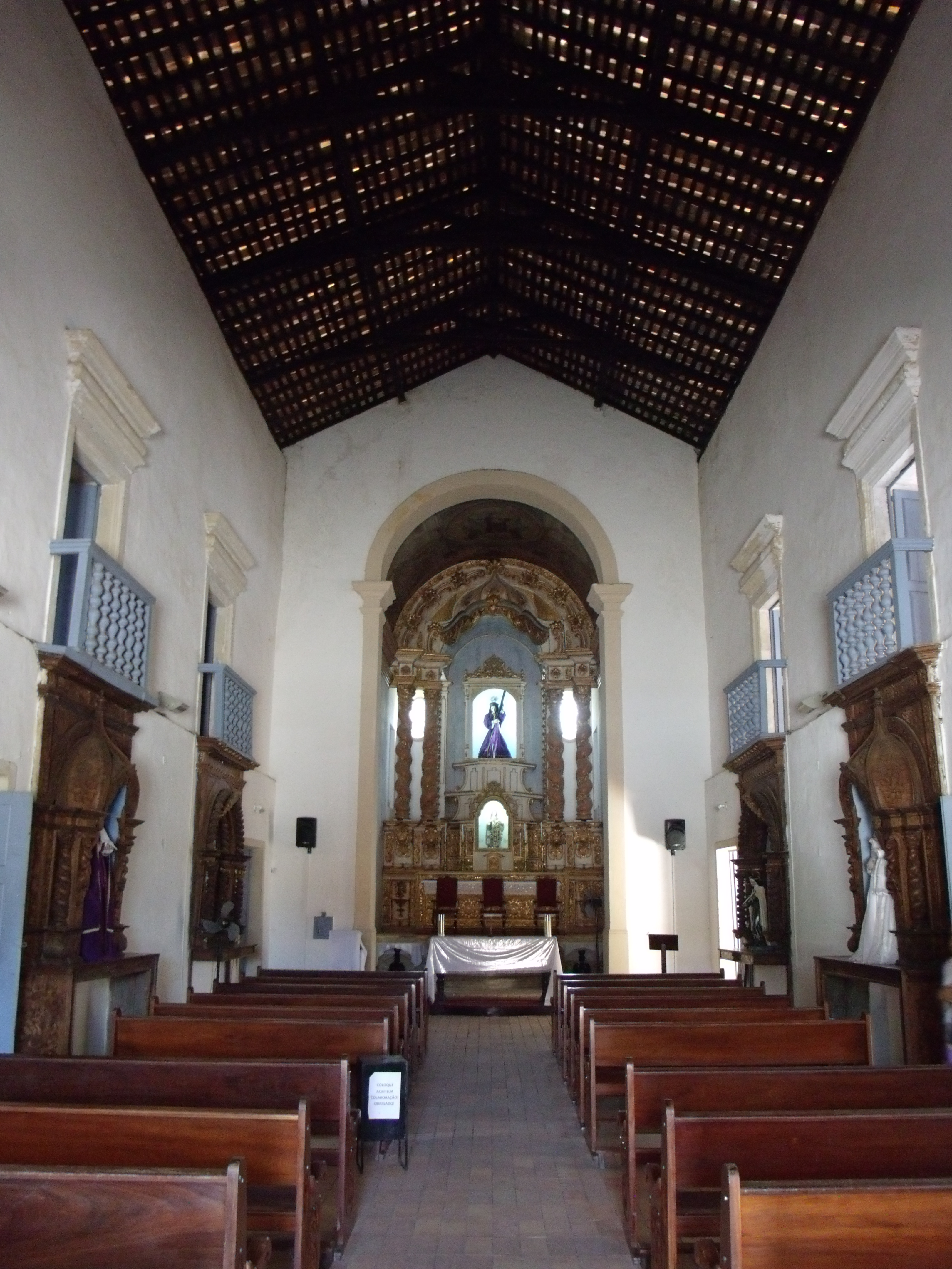 Igreja N.Srª do Carmo 1720 - São Cristóvão-SE